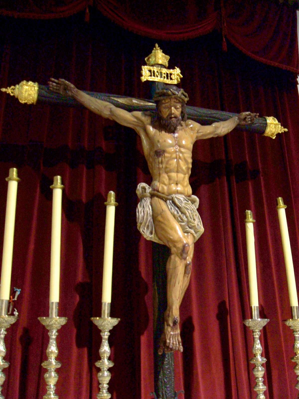 Baeza - Convento San Antonio